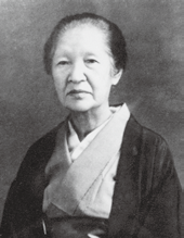 町田和加 町田菊次郎後妻